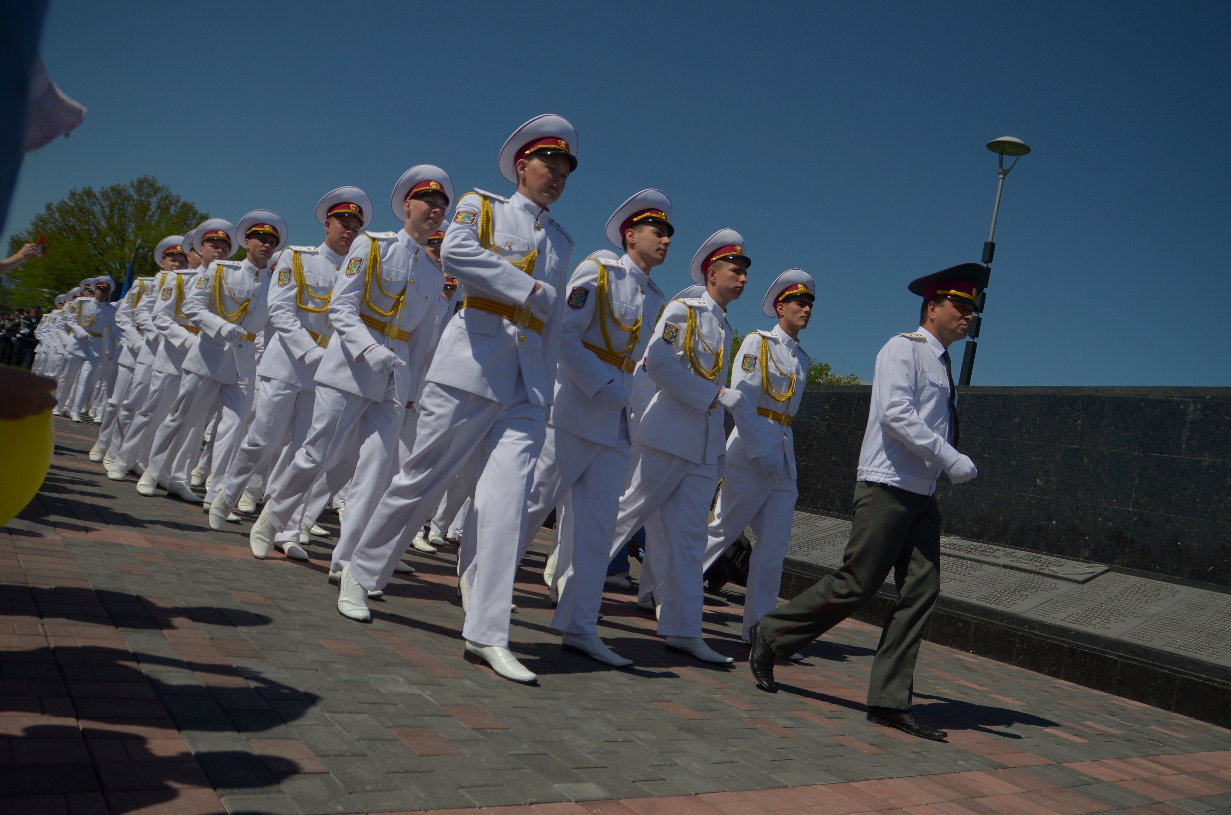 День Победы в Донецке